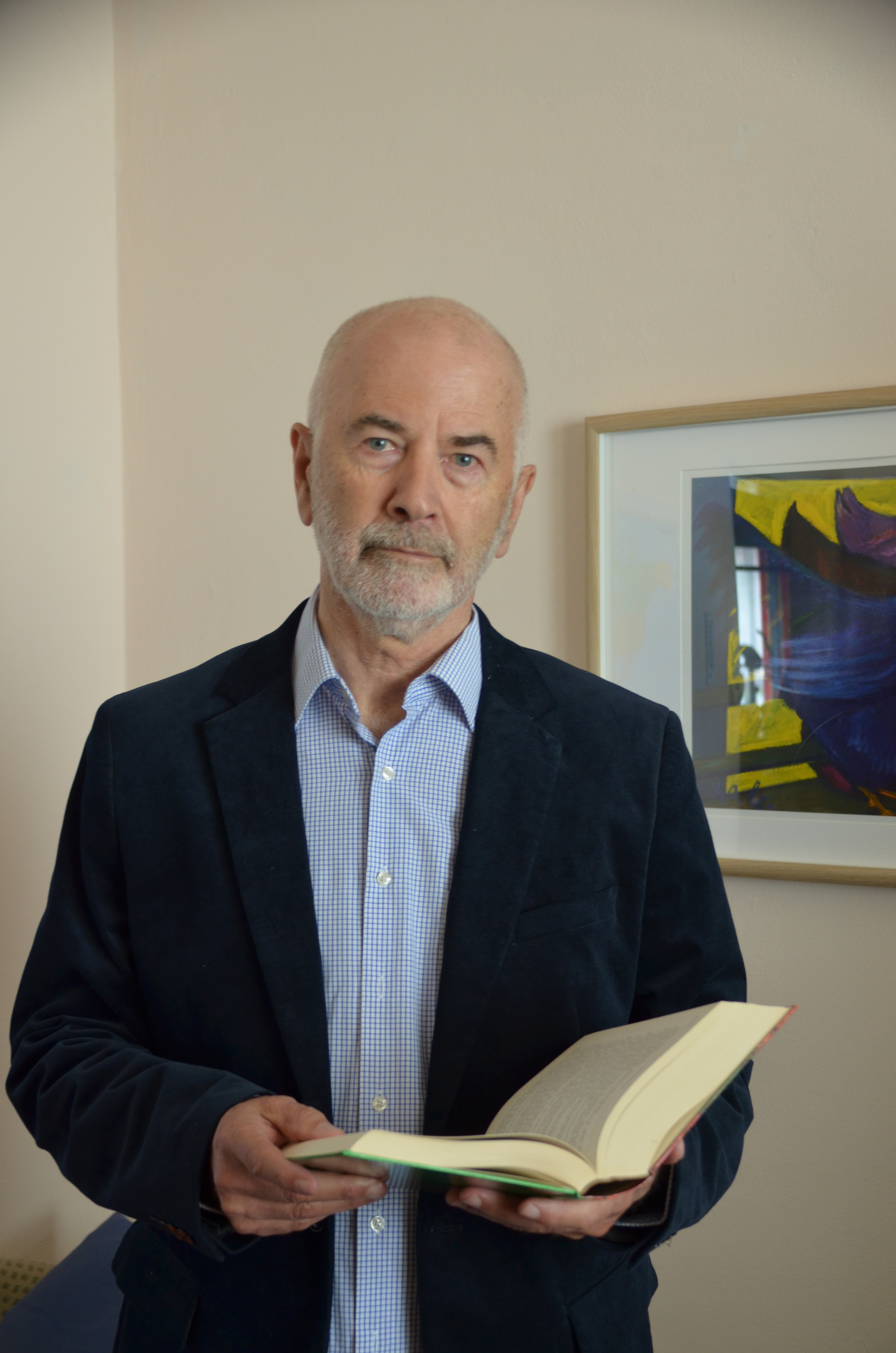 Foto